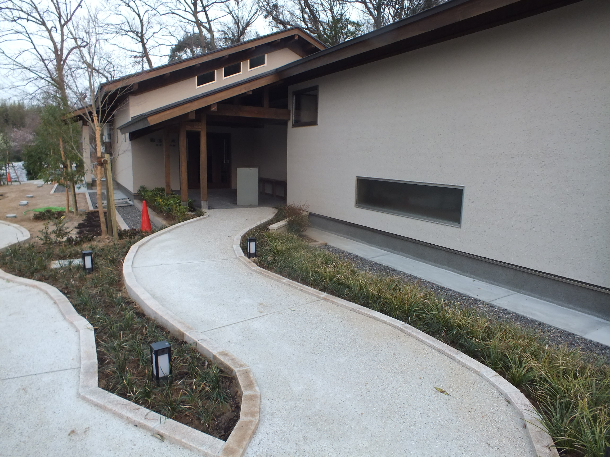 2018-03-29 Kuwatani-onsen 鍬渓温泉新棟建設中